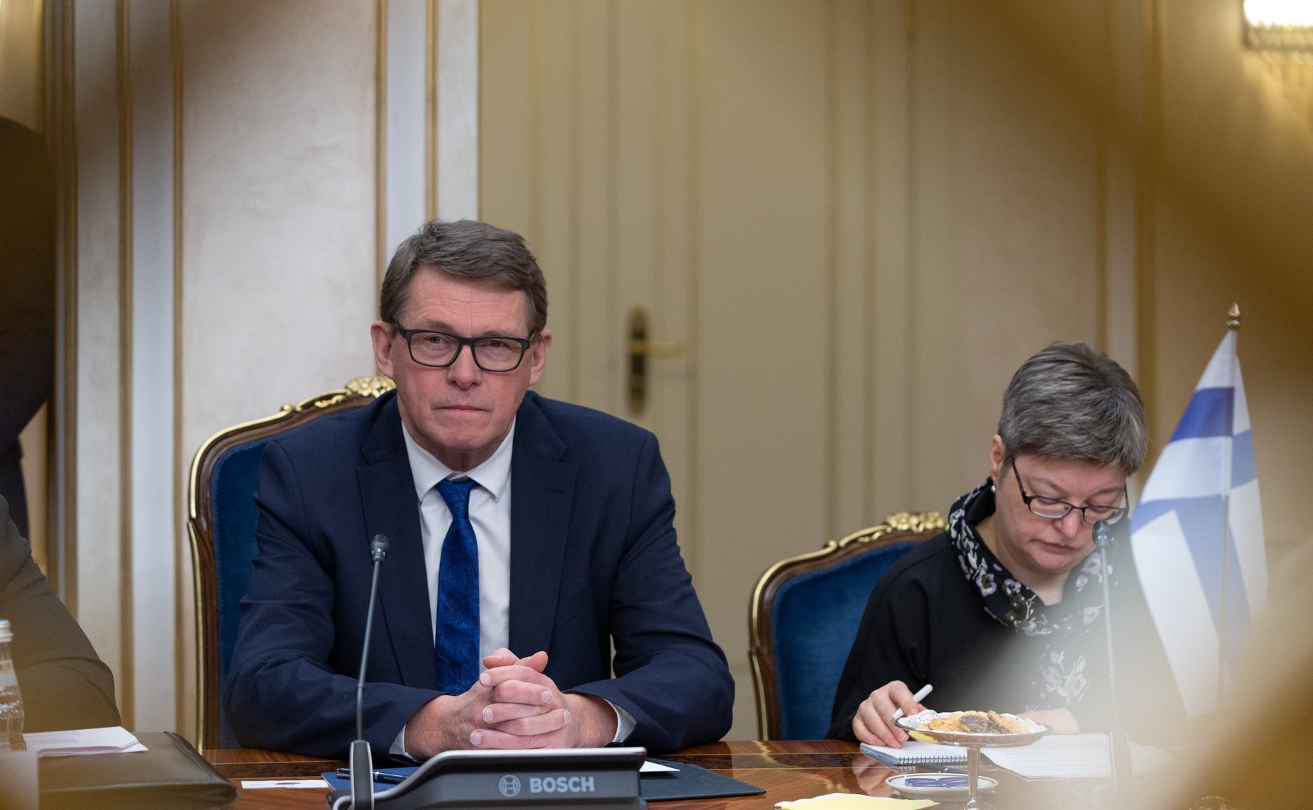 Matti Taneli Vanhanen (s. 4. marraskuuta 1955 Jyväskylä) on suomalainen poliitikko.